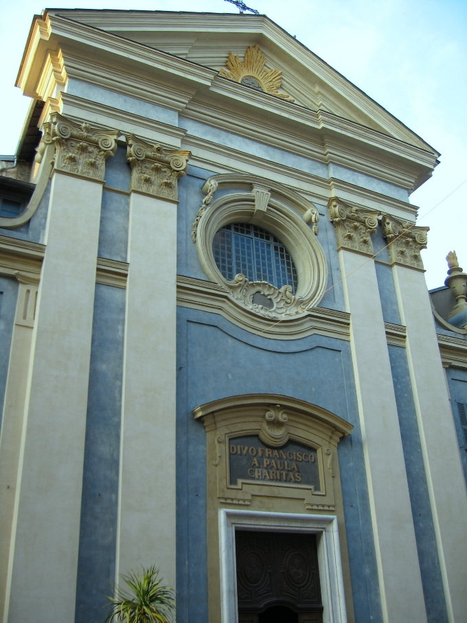 La façade de l'église Saint-François-de-Paule dans le Vieux-Nice